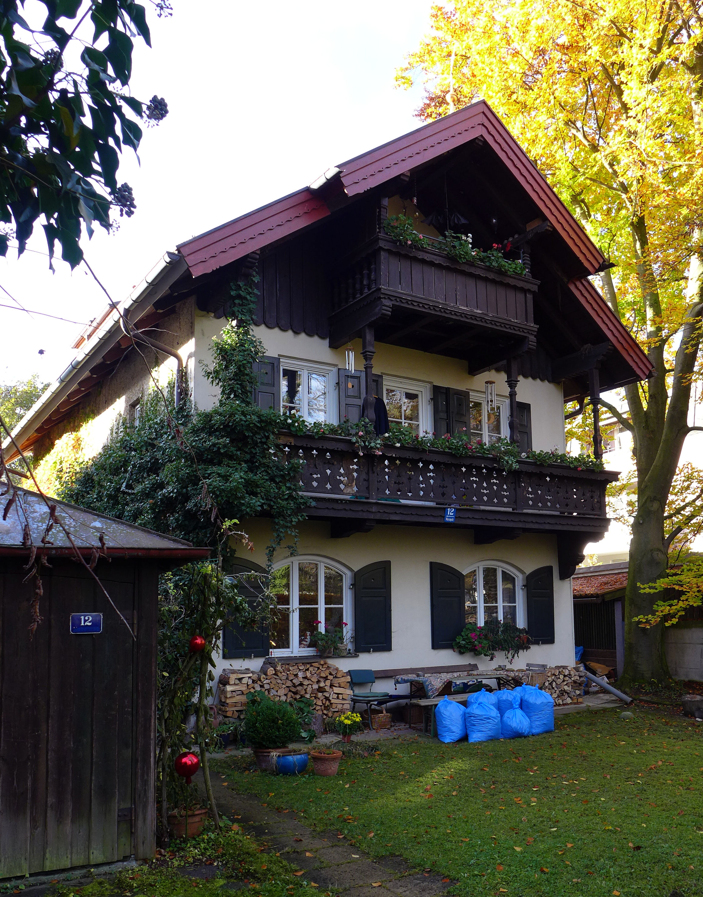 Marsopstr 12, München